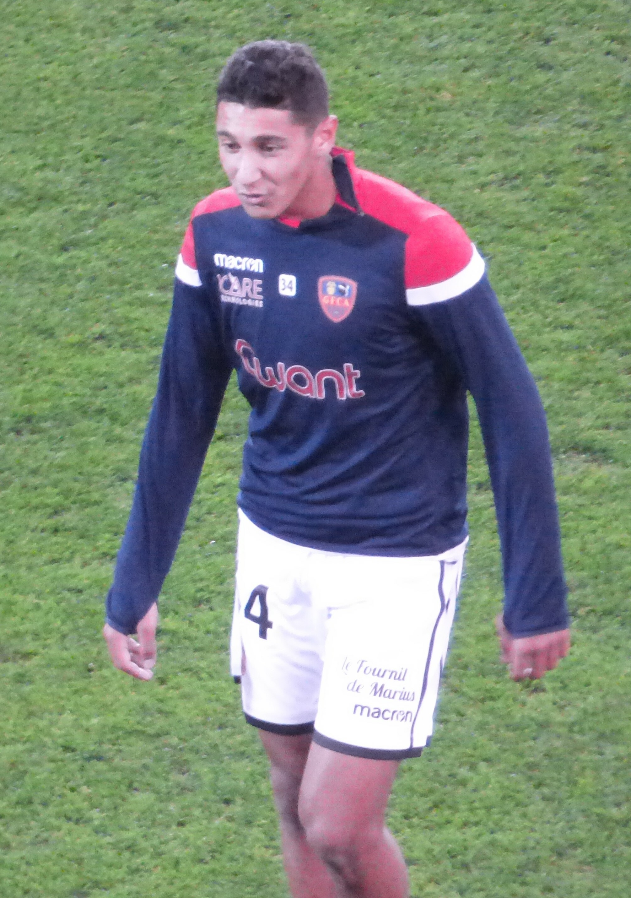 Mohamed Medfai avant le match RC Lens / GFC Ajaccio, comptant pour la onzième journée du championnat de France de Ligue 2 2018-2019 au Stade Bollaert-Delelis, le 22 octobre 2018.